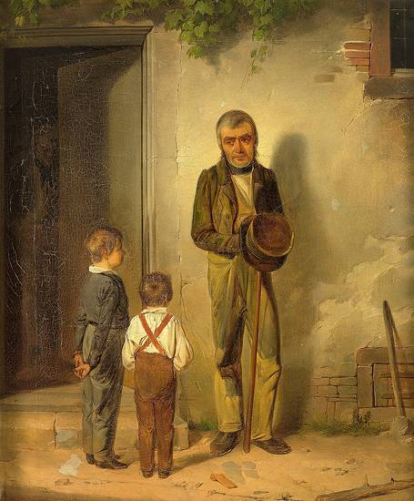 Zwei Knaben begaffen einen Bettler